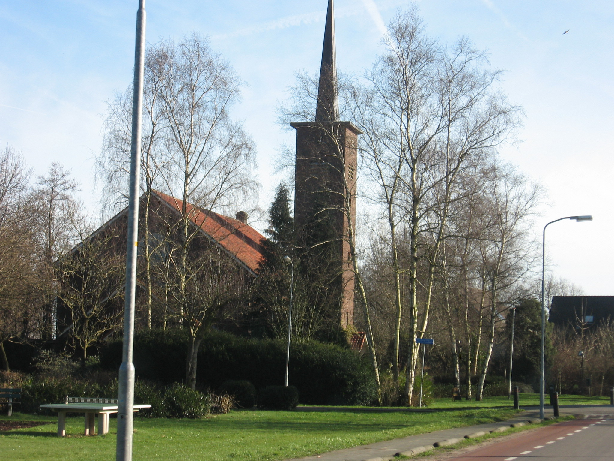 Barneveld